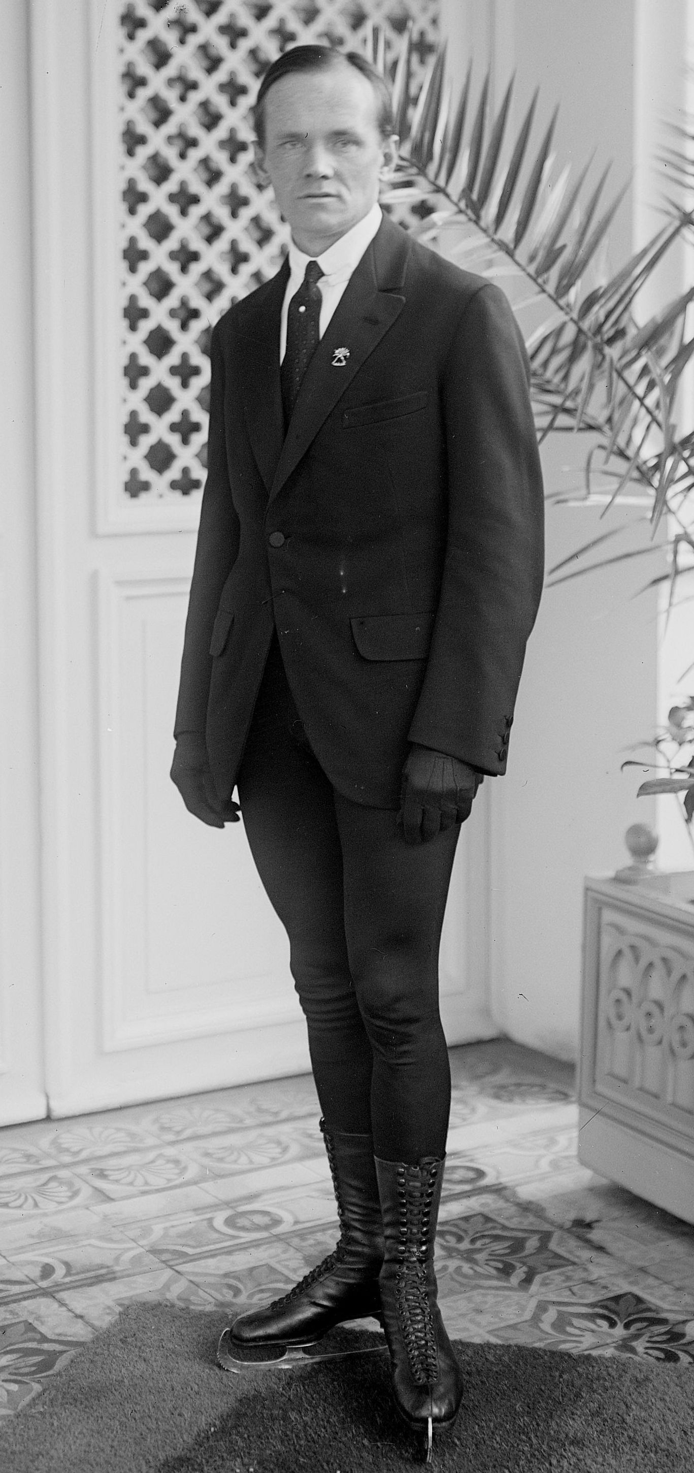 Alfred Mégroz, champion suisse [de] patinage : [photographie de presse] / [Agence Rol]